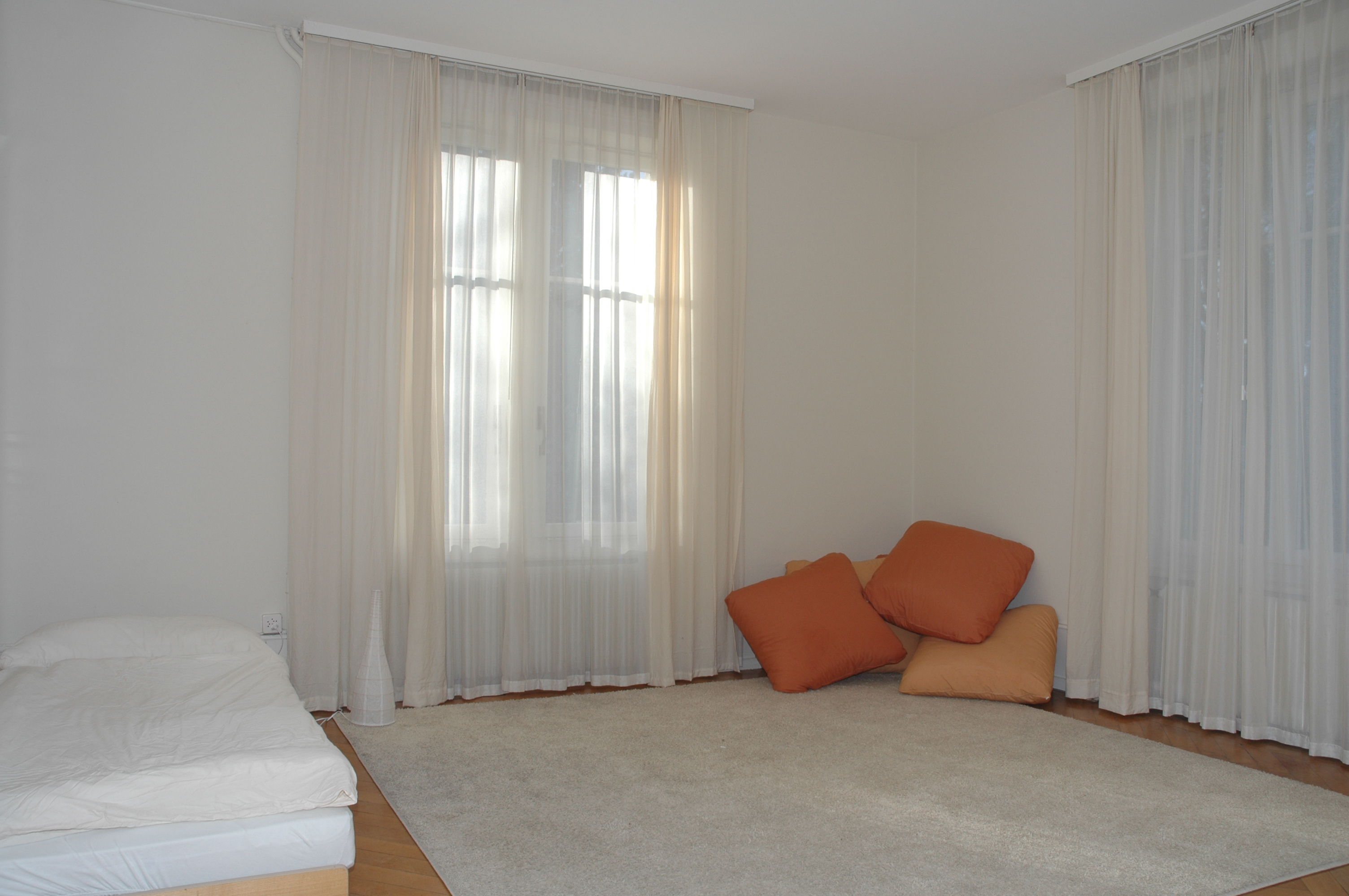 1:1 Begleitung in einem spärlich möblierten und in Pastellfarben gehaltenen Raum